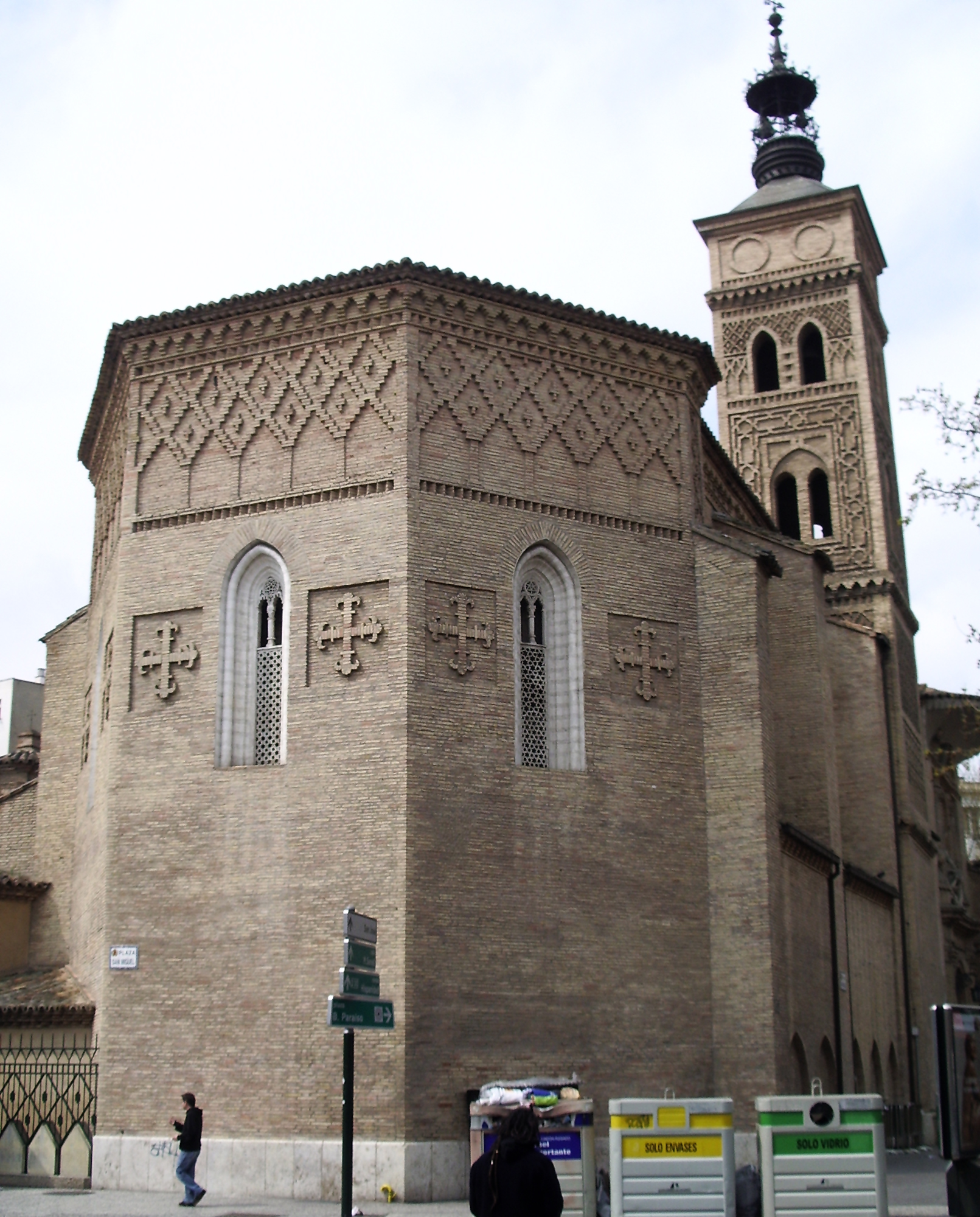 Iglesia de san Miguel de los Navarros